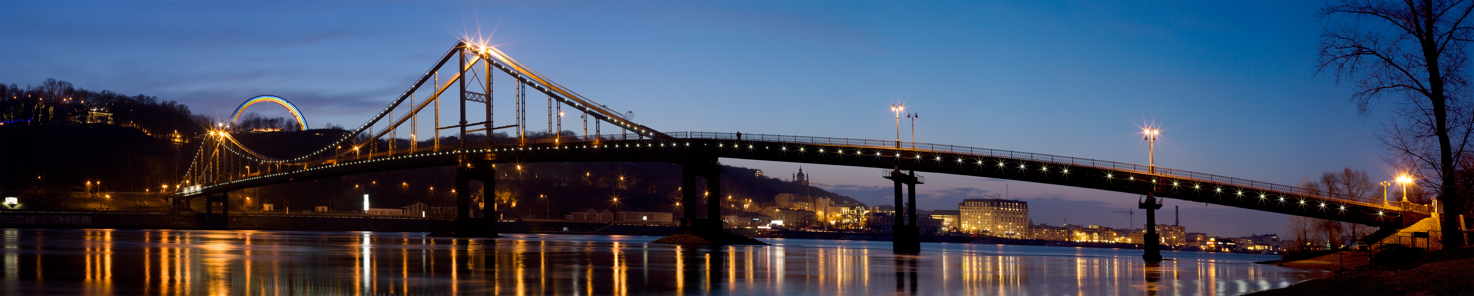 На панораме изображен киевский парковый мост на закате со стороны Трухановского острова в сторону ст. м. Почтовая площадь. Фотография сделана 14-02-2009 в 17:44.